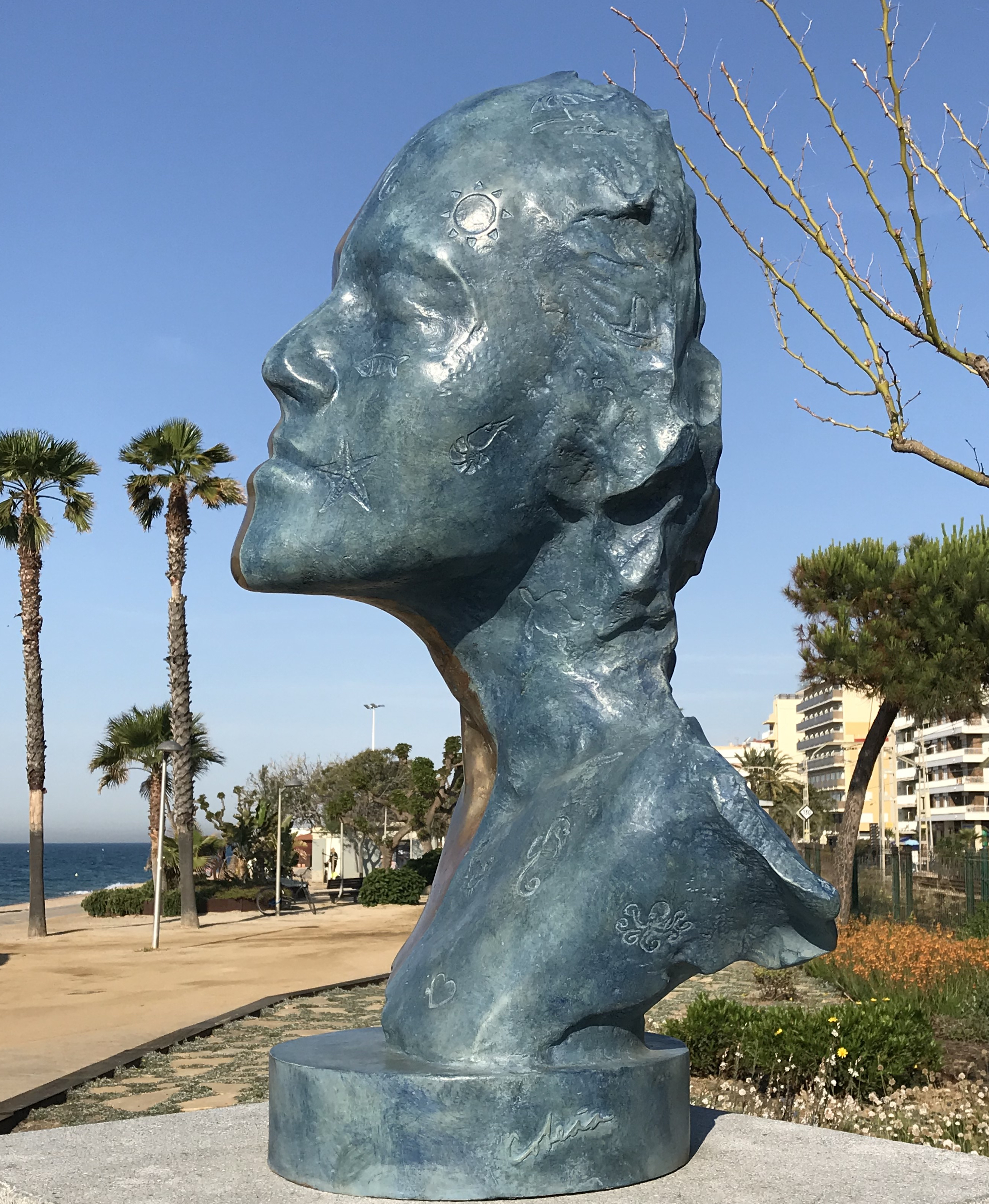 Escultura Pública en Pineda de Mar (Barcelona)